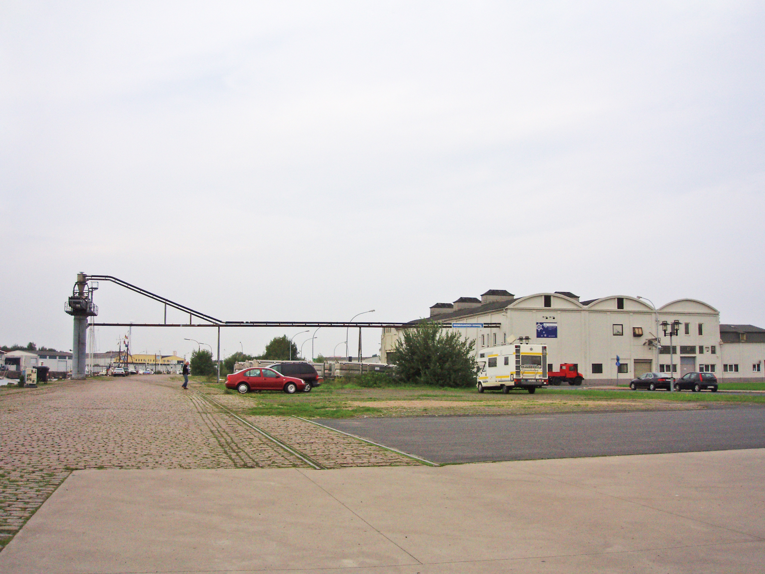 Eisfabrik am Fischereihafen in Bremerhaven